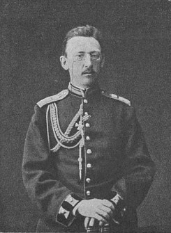 Князь Эммануил Николаевич Мещерский (1832—1877)